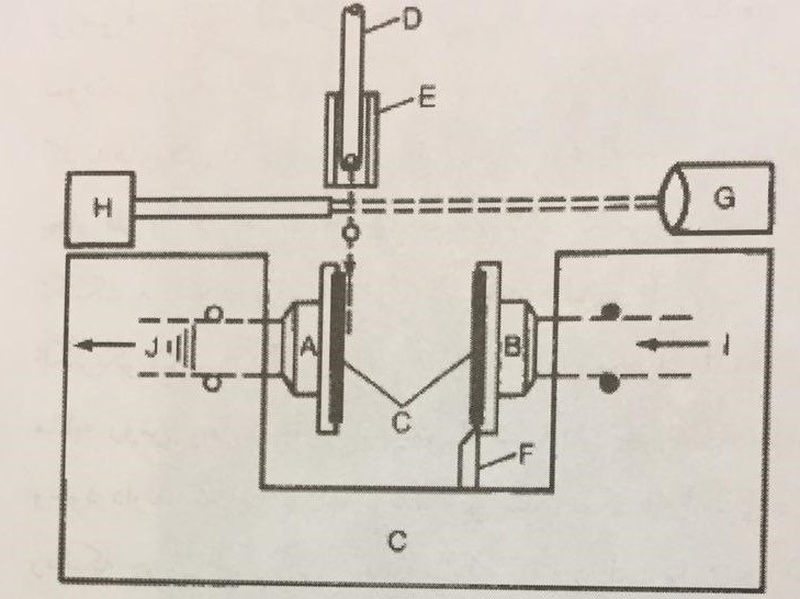 نقشه ی شماتیک از دستگاه پیستون-سندان مورد استفاده برای انجماد سریع قطرات مذاب در سرعت های سردکردن ۱۰۰۰۰-۱۰۰۰۰۰۰ کلوین بر ثانیه